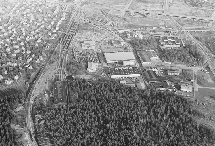 Älvsjö, Älvsjömässan, Siemens. Motiv: Älvsjö Nyckelord: Flygbilder, Riksintressen Kategori: Bostadsområde, Utställningslokal Älvsjö, Älvsjö industriområde, Siemens.